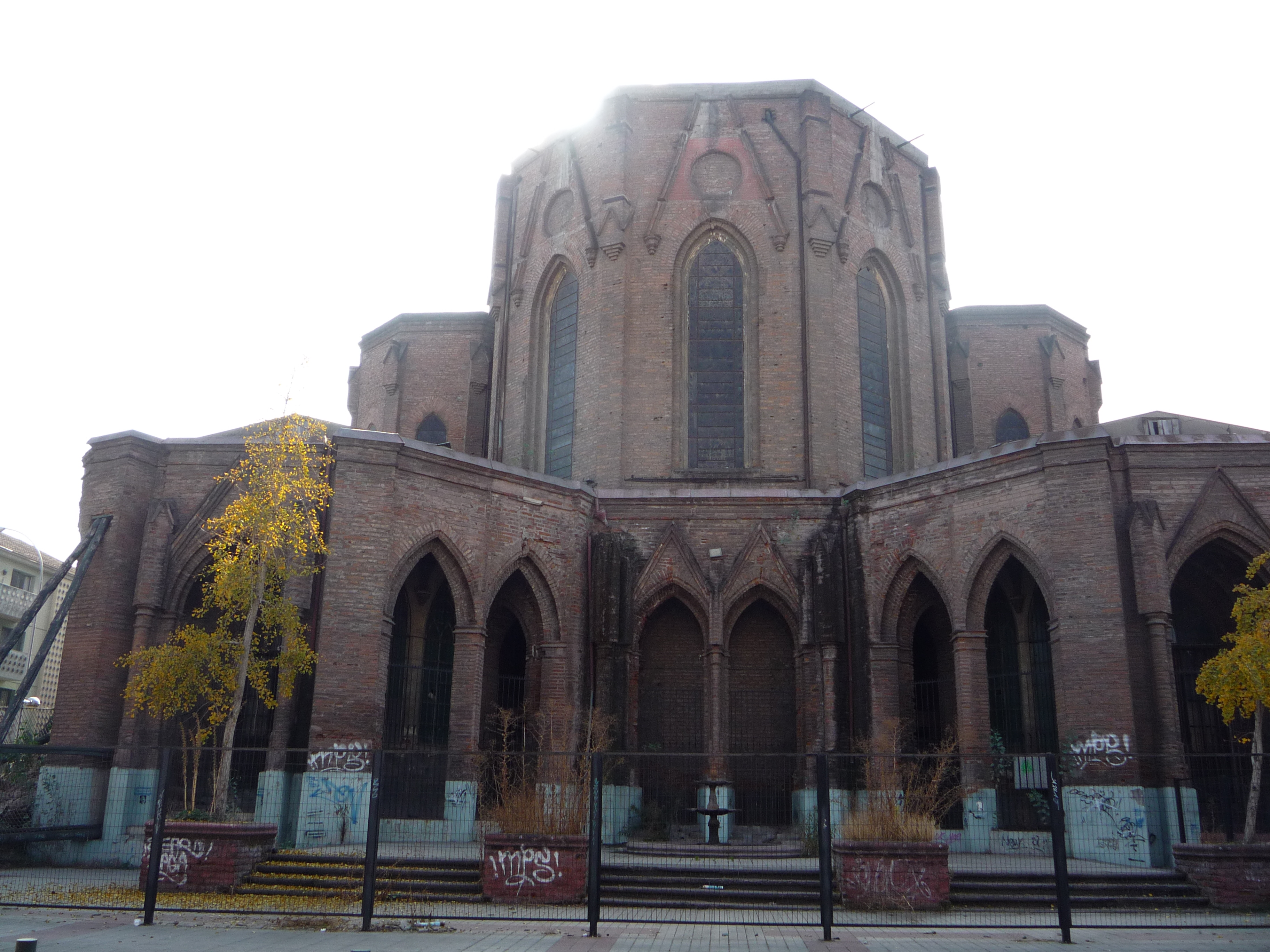 Basílica del Salvador This is a photo of a national monument in Chile: 207